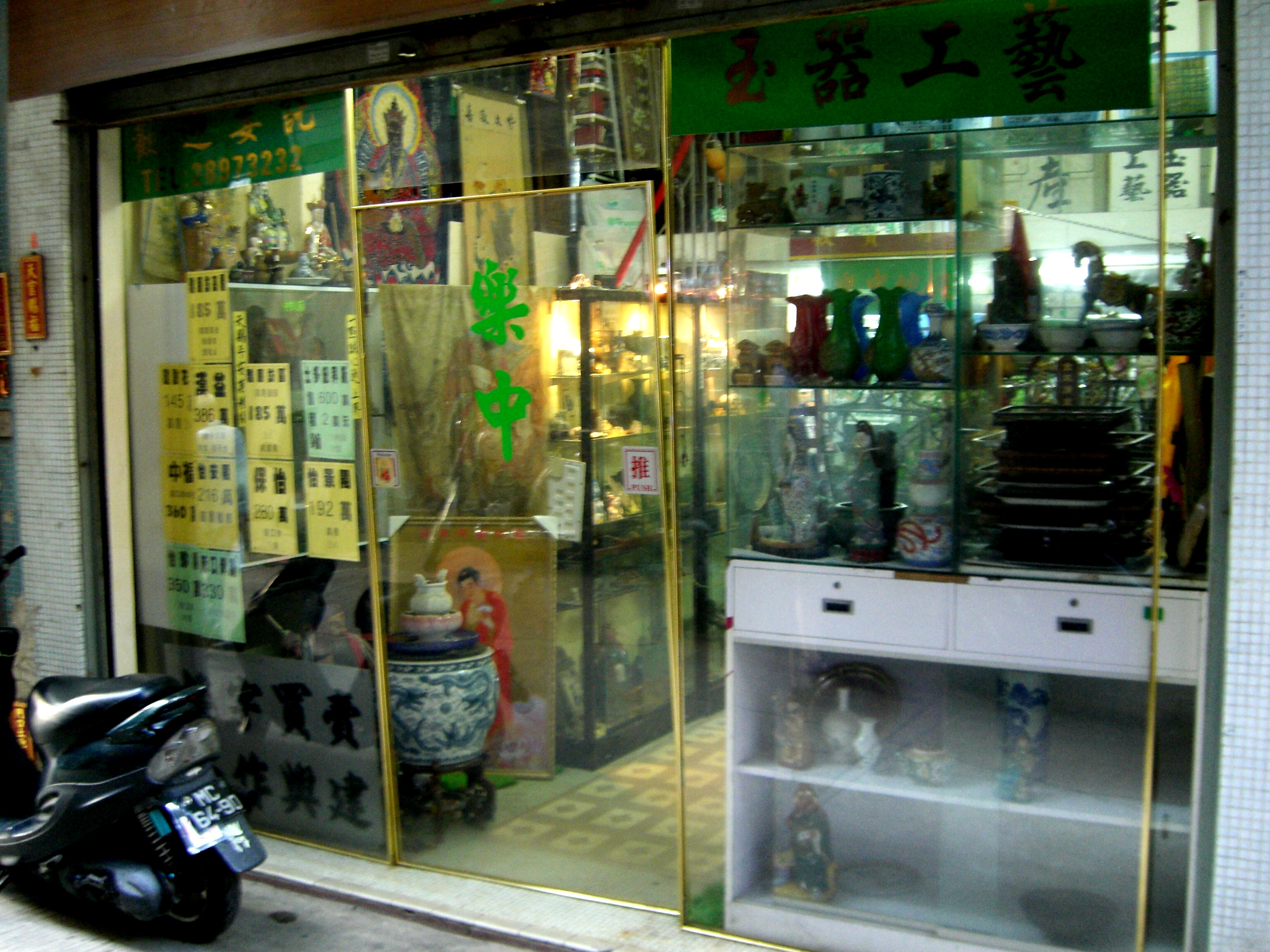 Travessa do Armazém Velho